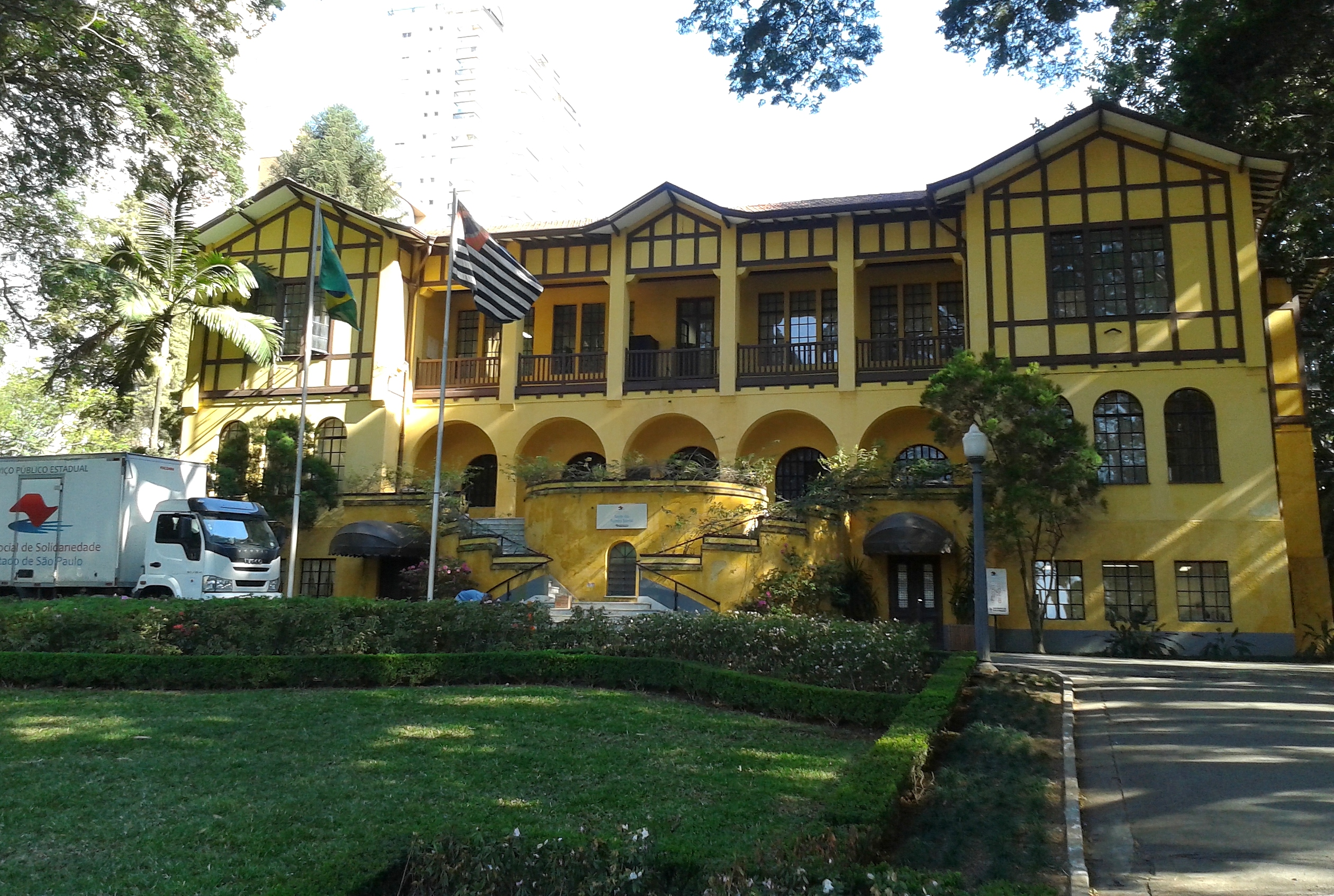 Sede Fundo Social de Solidariedade do Estado de São Paulo (FUSSESP), localizado na antiga sede do Parque da Água Branca. São Paulo, SP, Brasil.